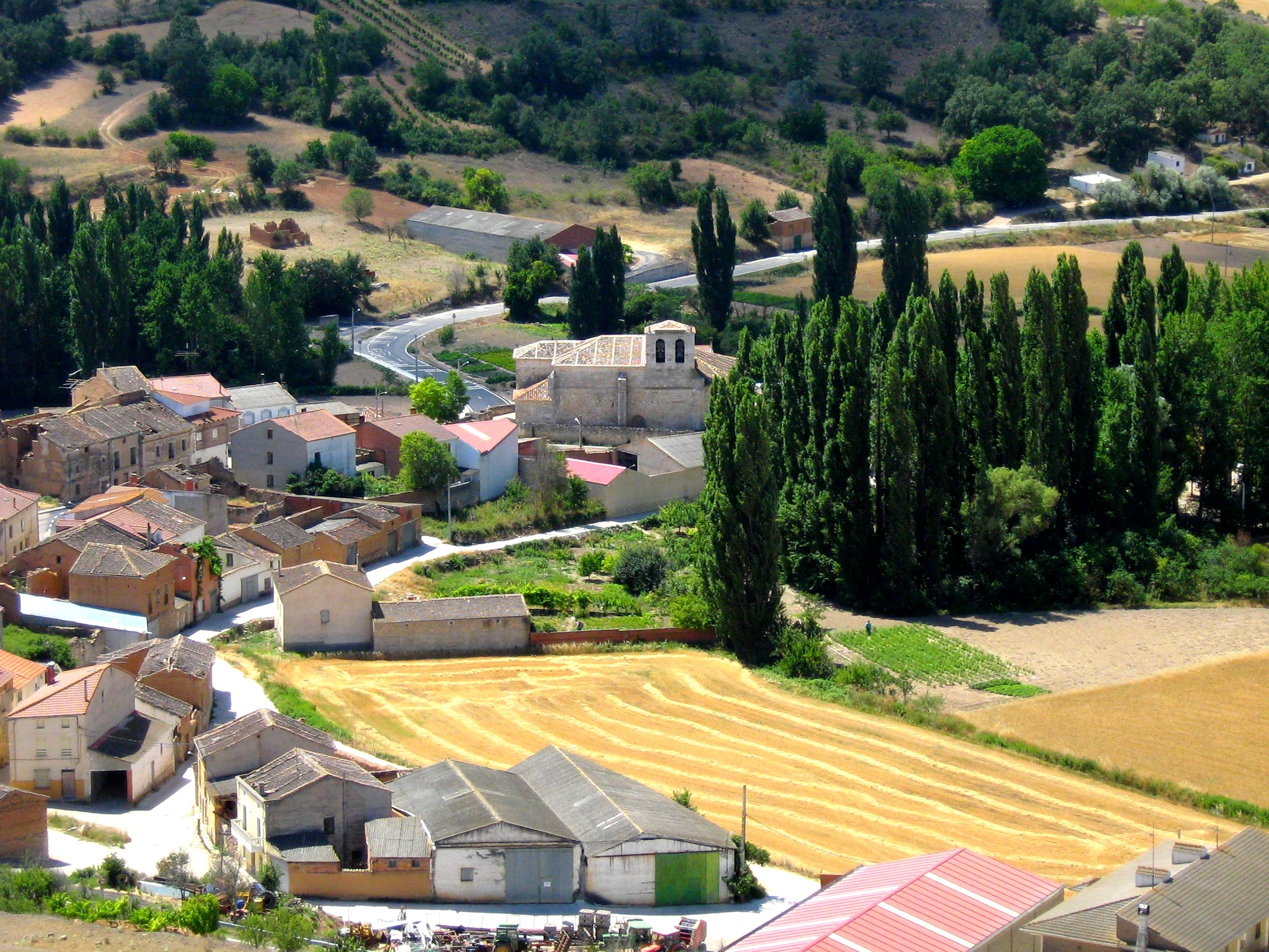 Corrales de Duero. Iglesia. Valle del Cuco. Campo de Peñafiel Valladolid.